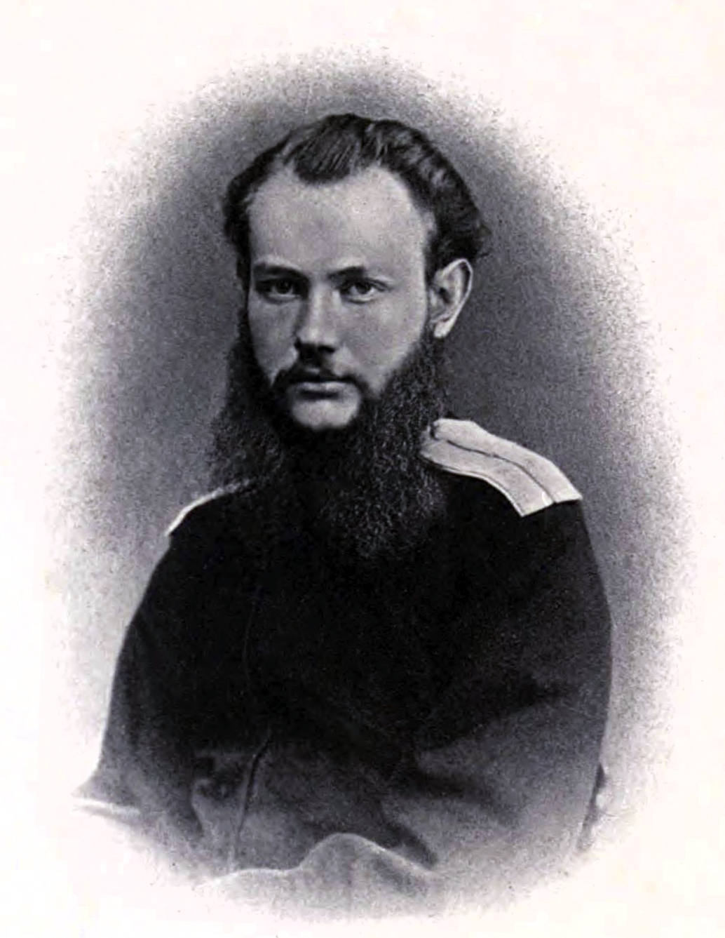 Peter Kropotkin